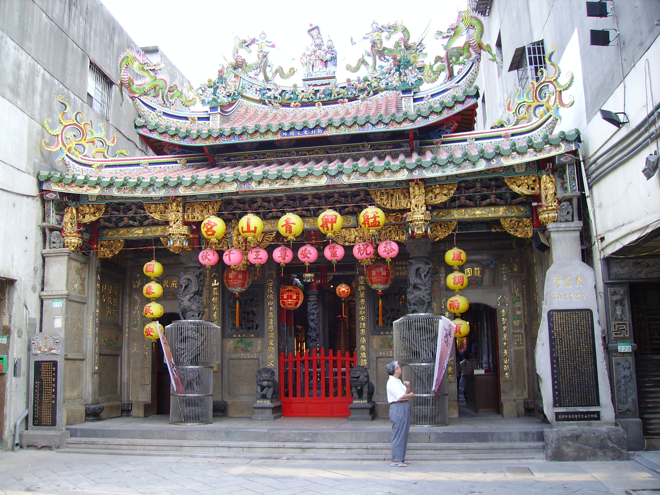 old temple in Taipei 臺北青山宮 (台北市萬華區) 2006.04